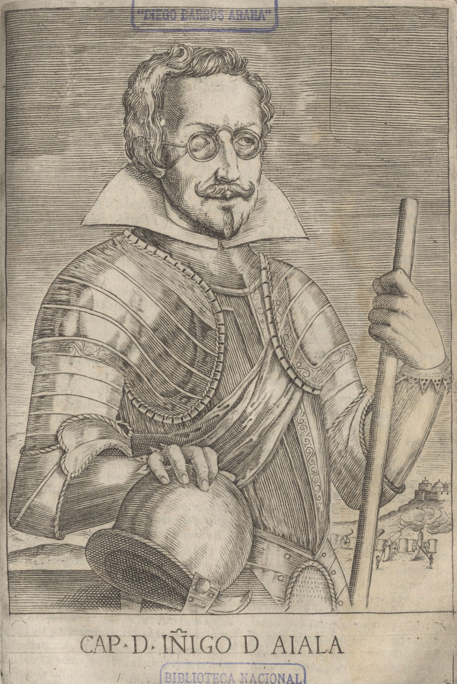 Íñigo de Ayala: spaniard captain in Arauco War. // Íñigo de Ayala: Capitán y maestre de campo español que luchó en la Guerra de Arauco.